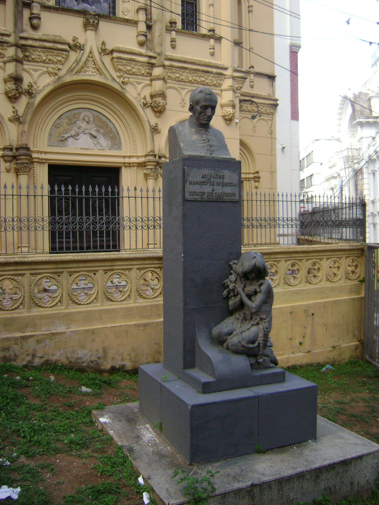 Estátua do Padre Manoel da Nobrega em Salvador, Bahia, Brasil.